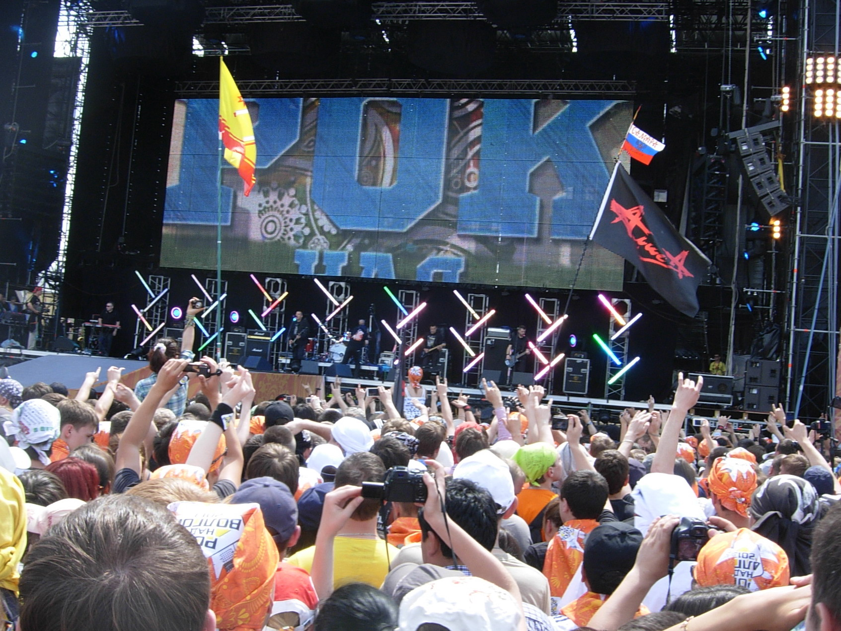 Смысловые Галлюцинации на Роке над Волгой-2013